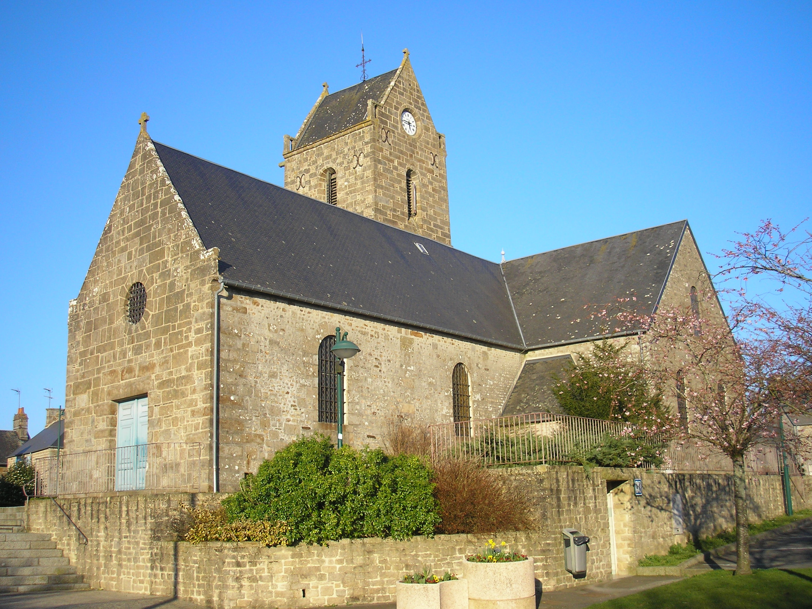 Saint-Martin-de-Landelles (Normandie, France). L'église Saint-Martin.